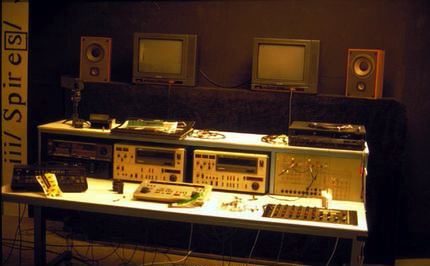 video-editing-room-at-v2